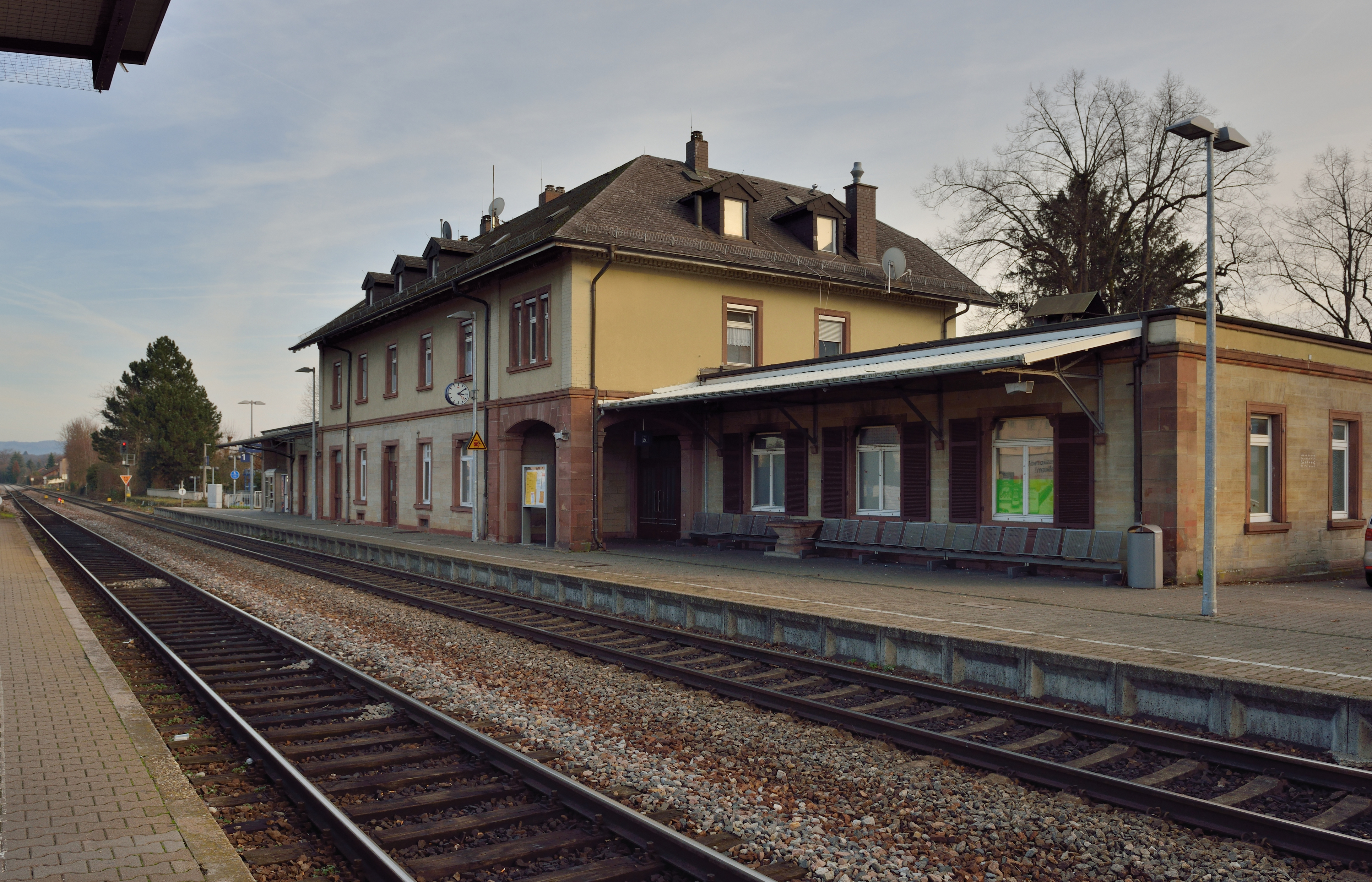 Rheinfelden: Bahnhofsgebäude